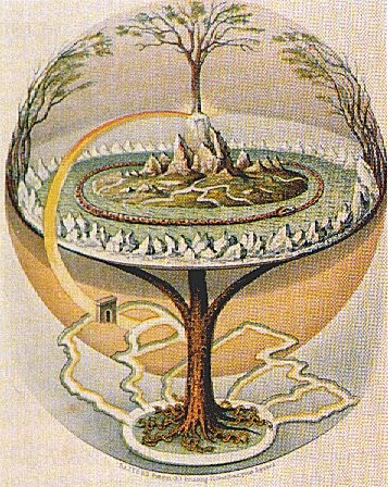 Pasaules koks Igdrasils, 1847, no prozas krājuma Edda, 13.gs.